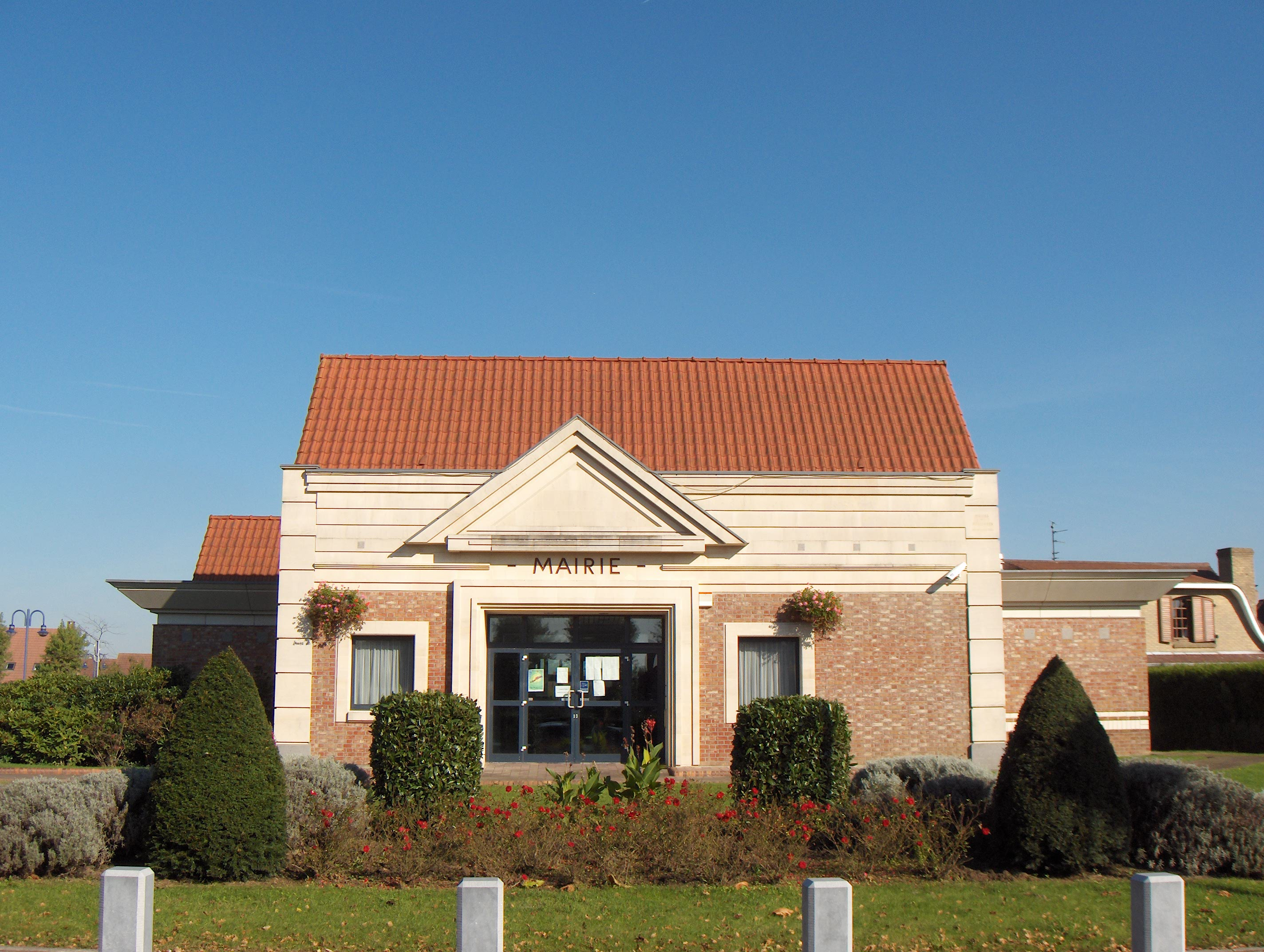 Lompret, mairie de la commune